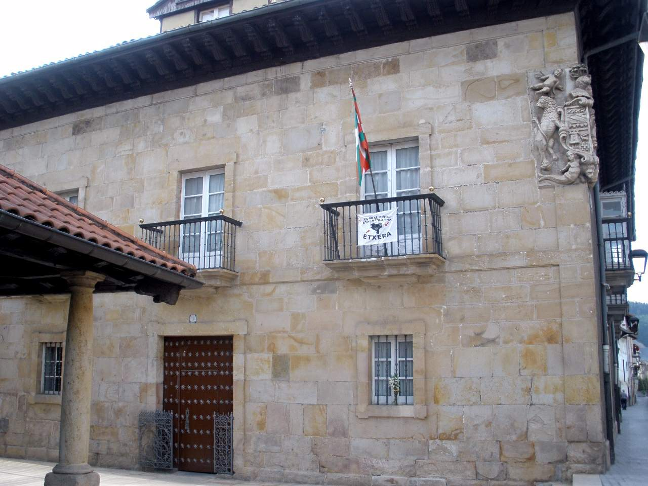 Aretxabaleta (Gipuzkoa) - Palacio de Arratabe-Ayuntamiento